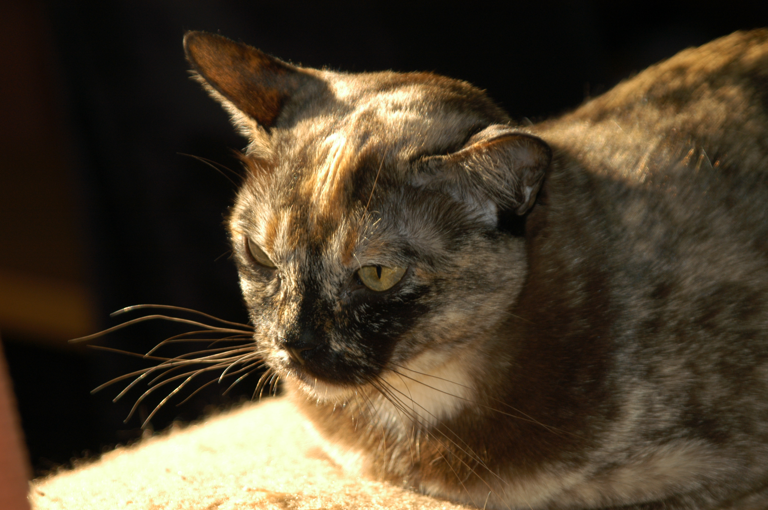 Flaemmchen, Burmakatze in brau-tortie